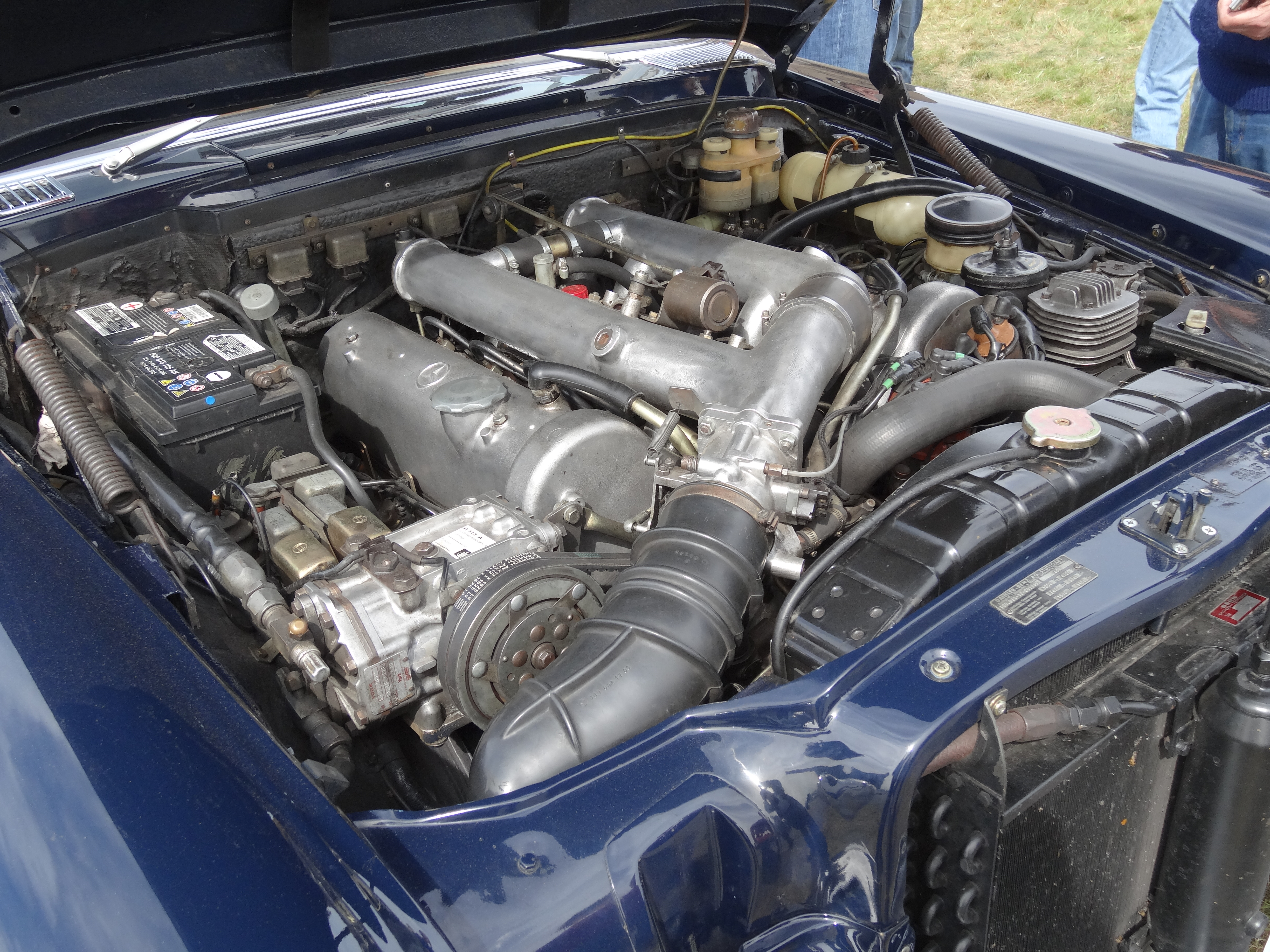 Impressionen vom ersten Classic Motor Day auf dem ehemaligen Flugplatz Hungriger Wolf in Hohenlockstedt.